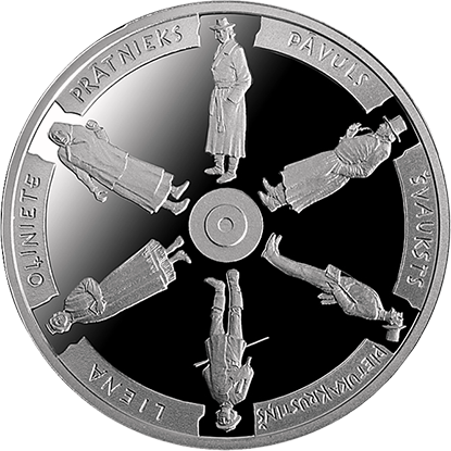 Lats commemorative coin